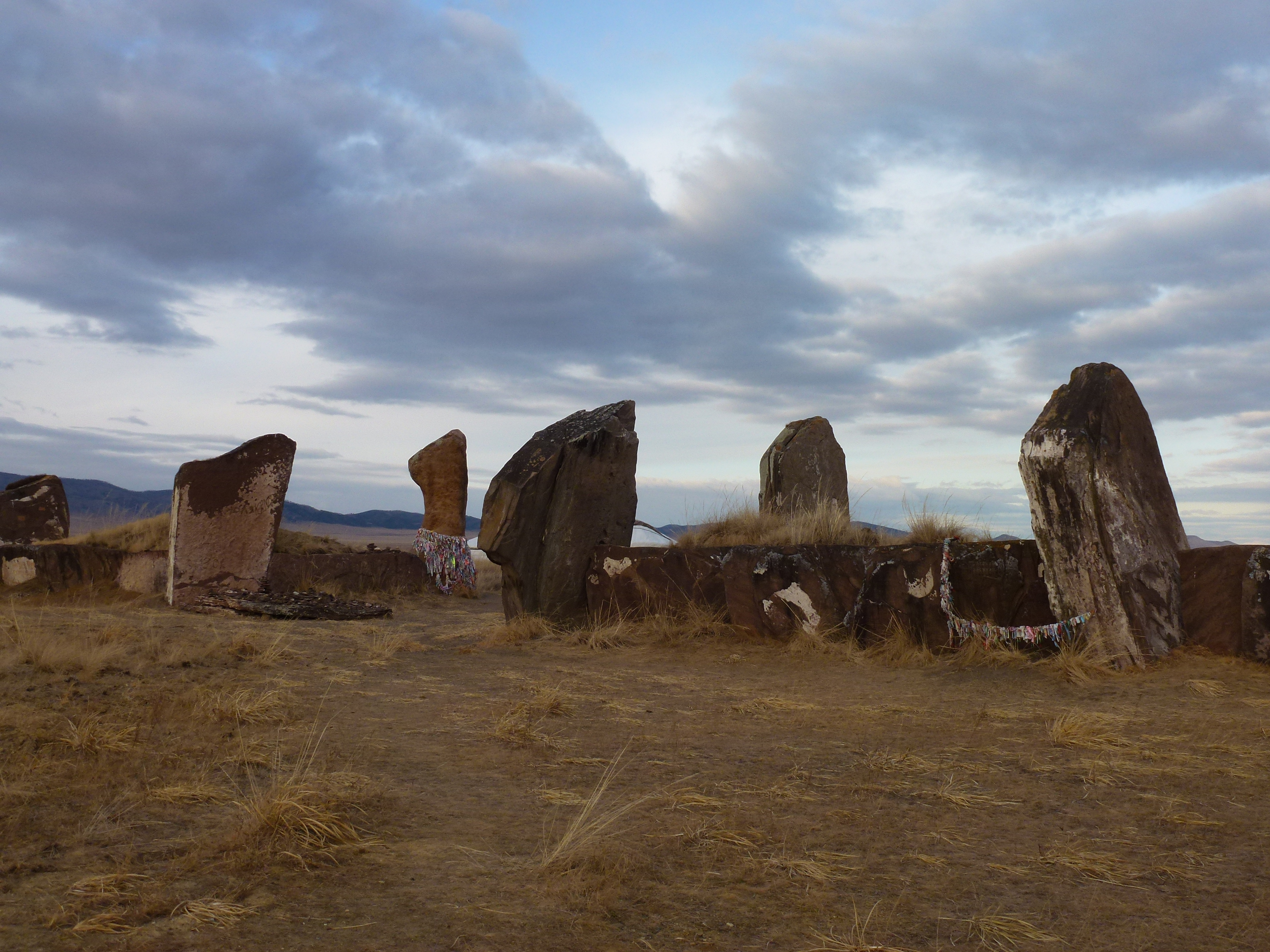 Первоначально имел форму пирамиды высотой с 8-этажный дом